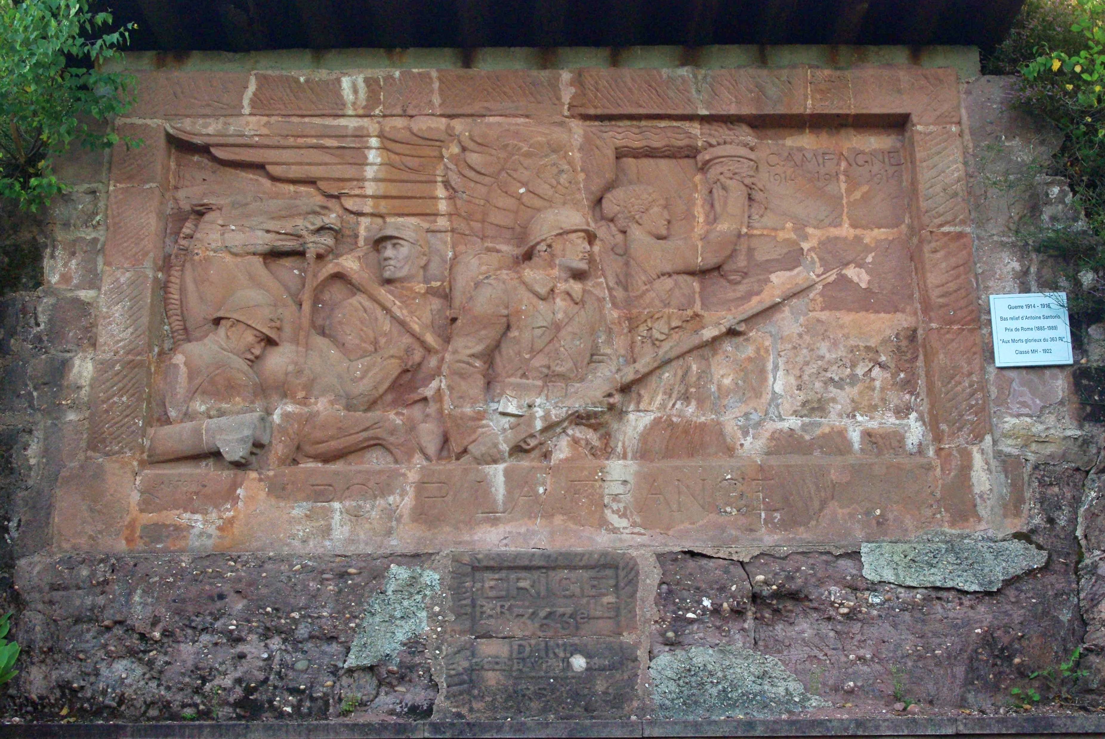 Bas relief sculpté dans le grès vosgien en hommage aux morts de la guerre 14-18 par Antoine Sartorio Localisation Commune de PIerre-Percée (54 Meurthe-et-Moselle)